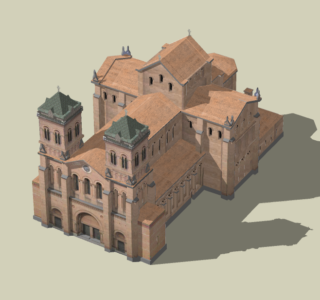 Imagen de modelo en 3D - Goggle Sketchup - de la Catedral Basilica Metropolitana de Medellin